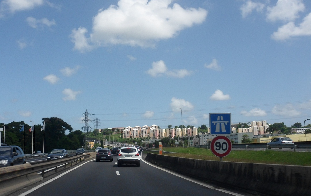 Entrée de l'Autoroute A1 (972) à Fort-de-France.